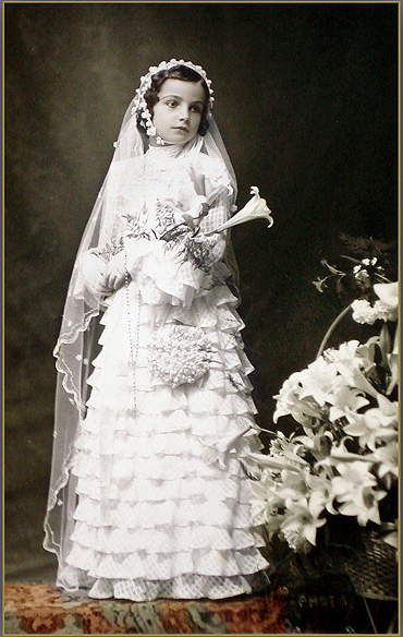 Marisa Frantz Panceri de família de Caxias do Sul em sua Primeira Comunhão